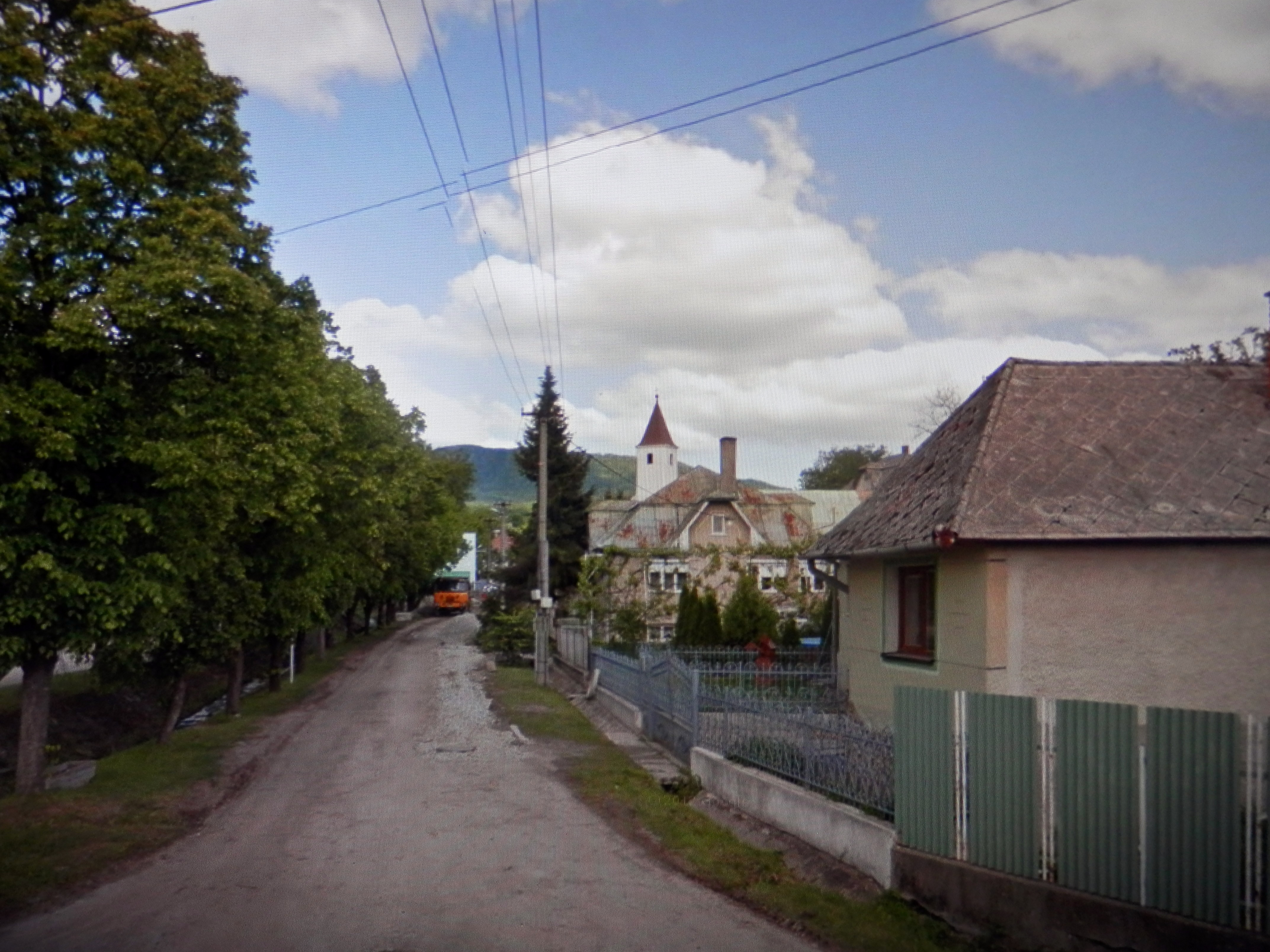 Kostol. Obec Rankovce, okres Košice - okolie. Slovensko.